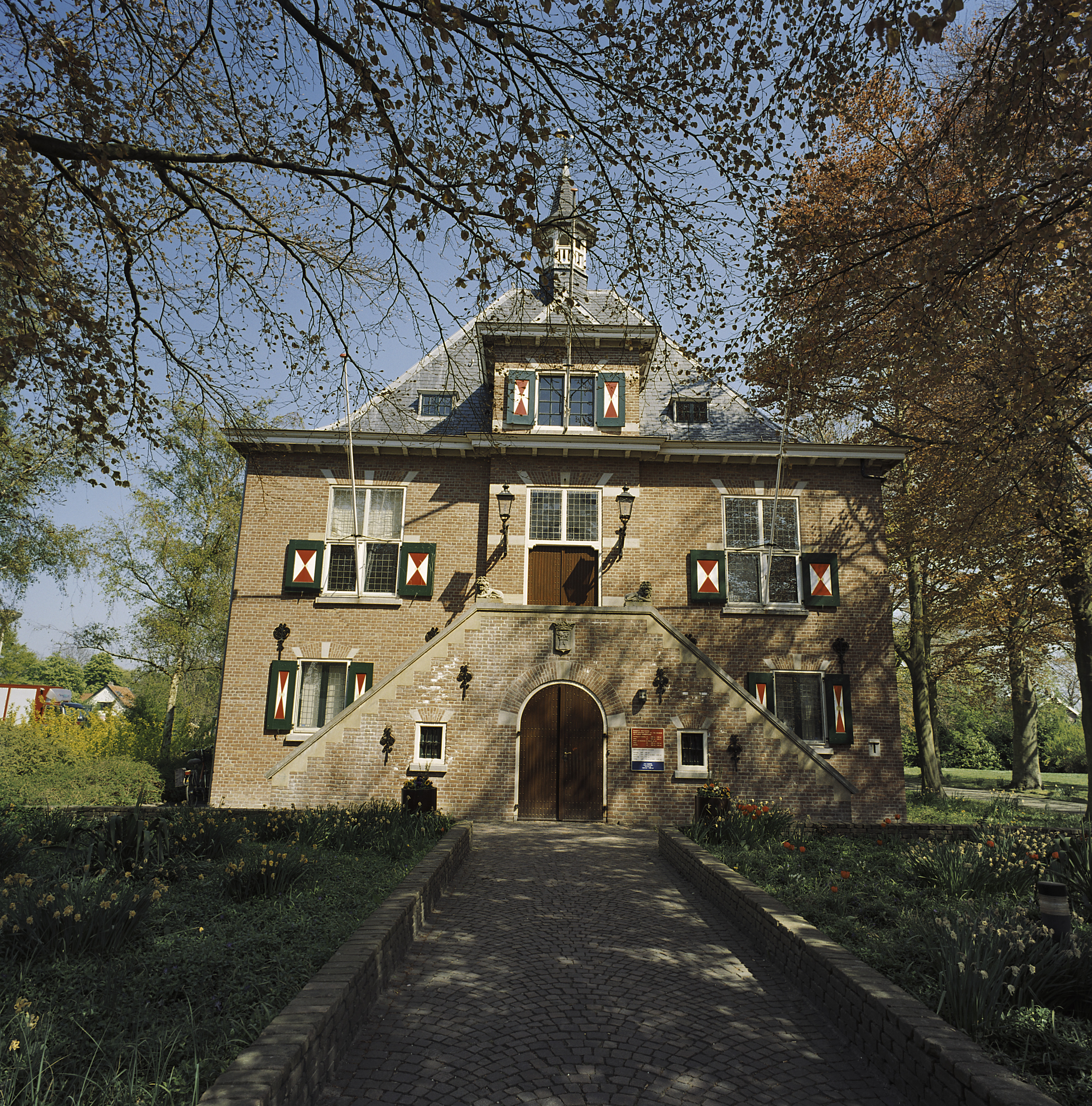 Raadhuis: Overzicht voorgevel (opmerking: Gefotografeerd voor Monumenten In Nederland Zuid-Holland)